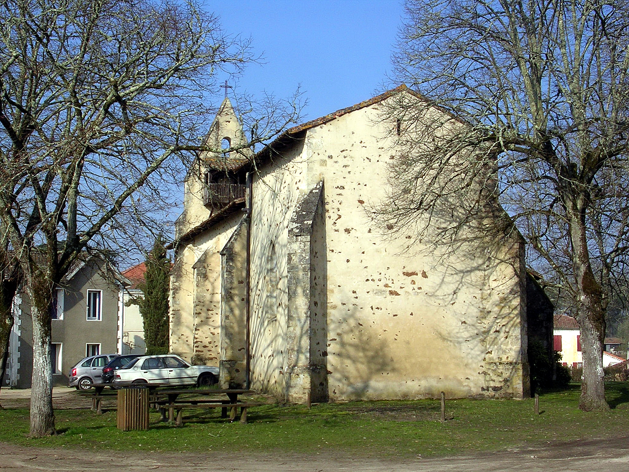 Église Notre-Dame de Moustey